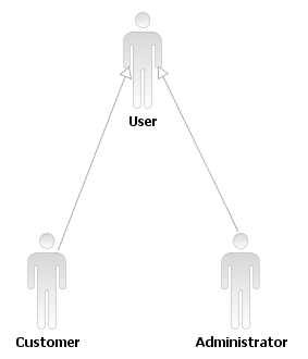 UML example - use case diagram - actor inheritance